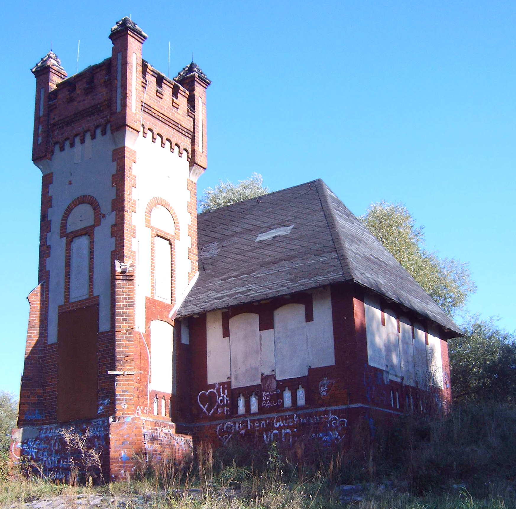 Schöpfwerk bei Prester zur Entnahme von Elbwasser für die Magdeburger Wasserversorgung